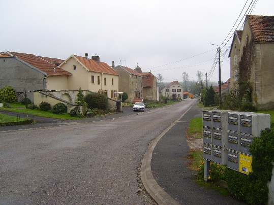 Vue depuis la mairie. Danglot Régis Image:Depuis_mairie.JPG